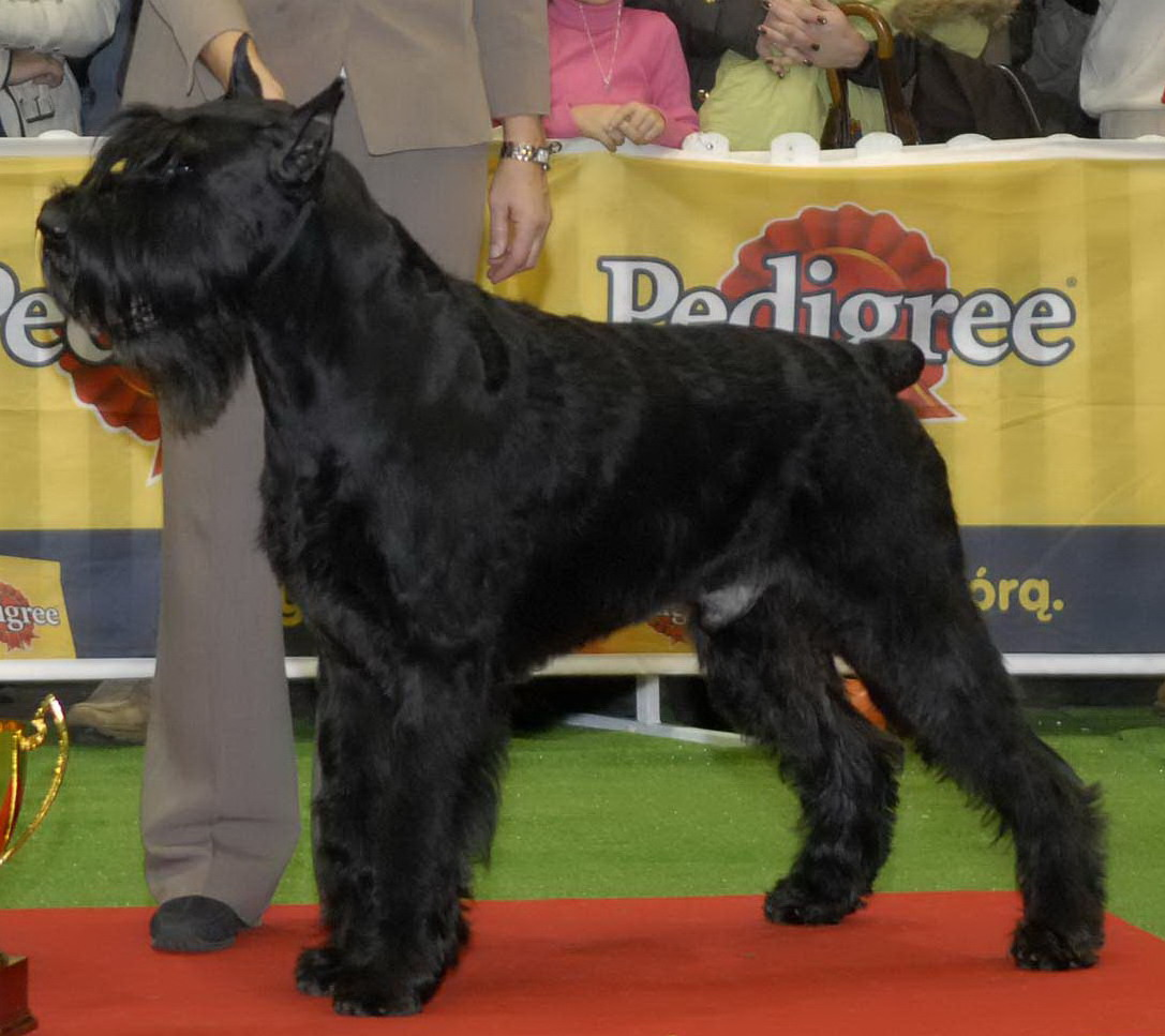 Stablemaster's NORTHERN HOPE - Zw. Św. Poznań 2006